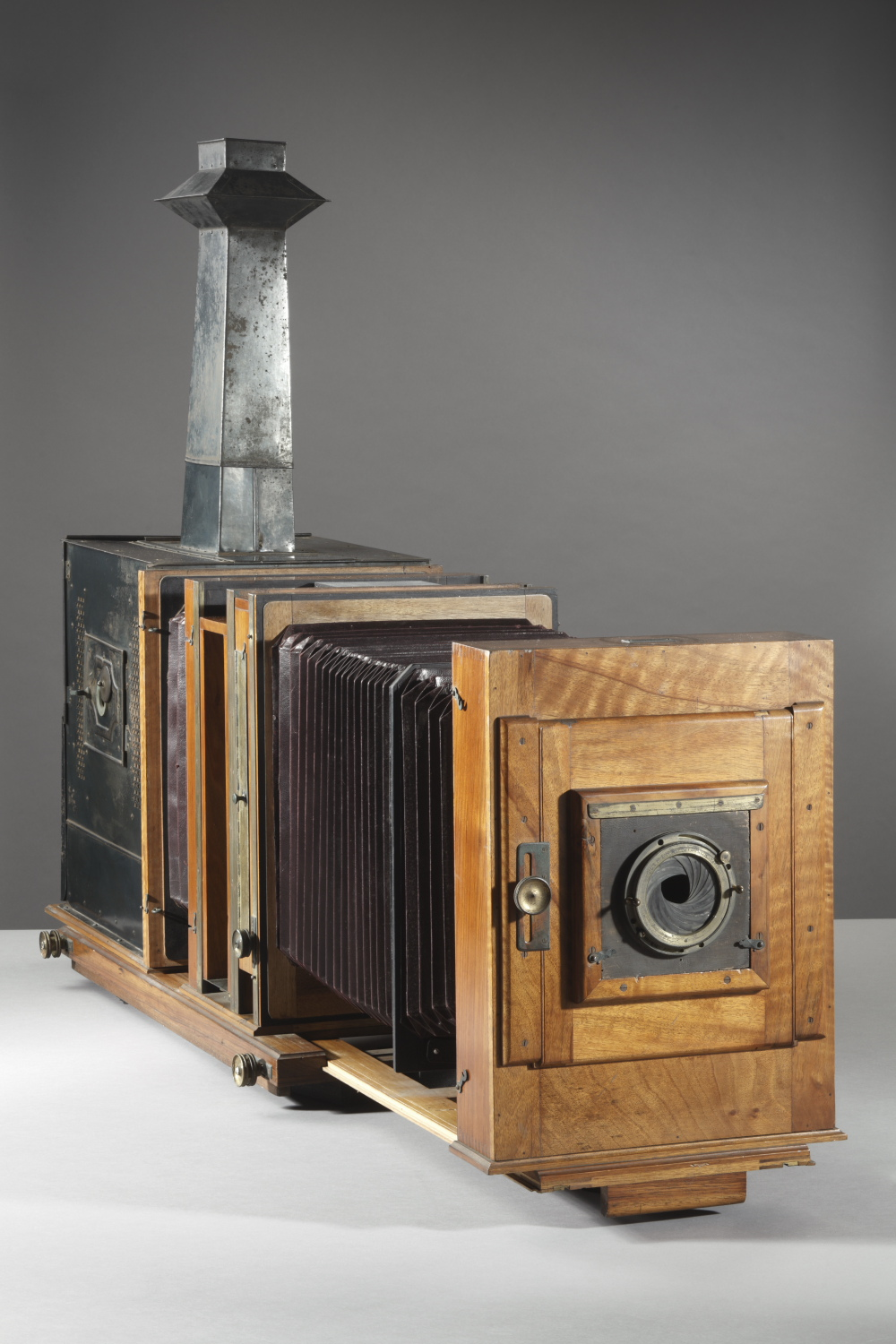 Appareil servant à l’agrandissement et à la réduction de plaques 18 x 24 cm. Le condensateur, l’objectif et la source de lumière, manquent. Le corps de la lanterne et la cheminée sont en tôle noircie. Les corps avant sont en noyé ciré, les soufflets en toile noire. Fabriqué par Demaria Frères